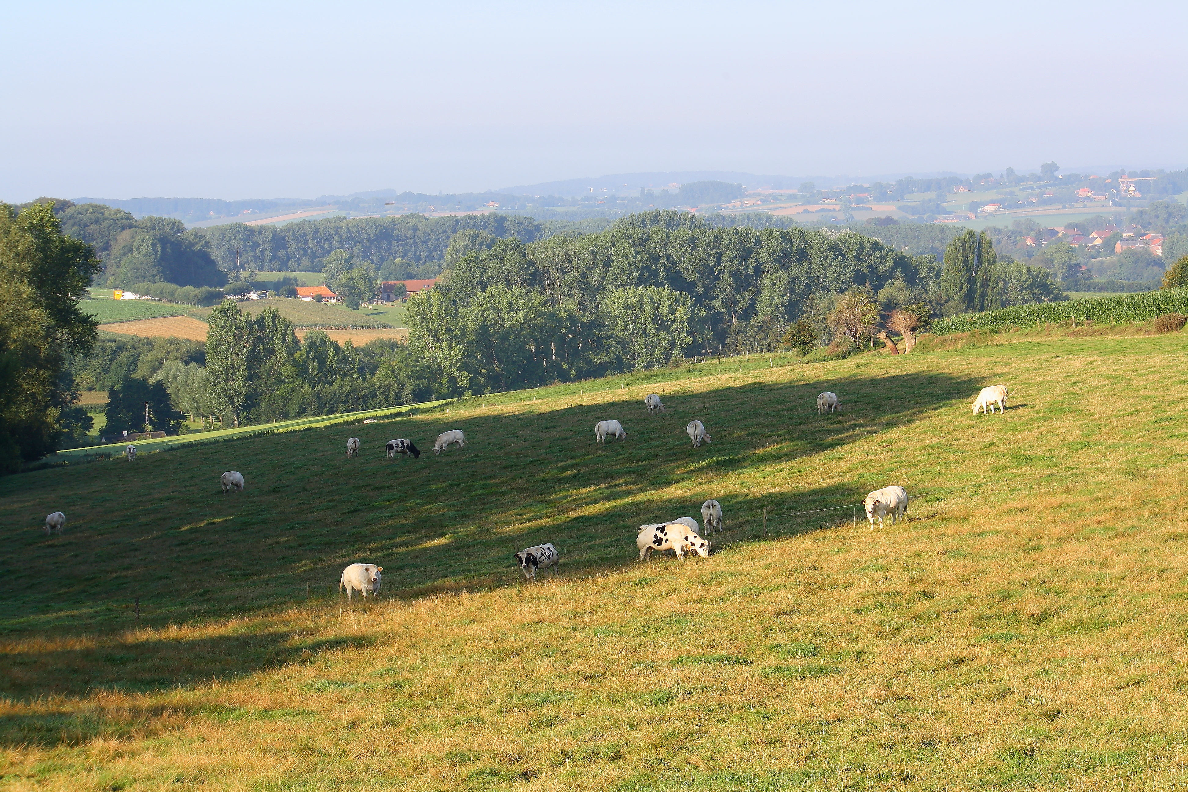 Vlaamse Ardennen, Maarkedal, Vlaanderen, België